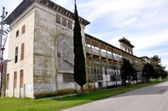 Frontón